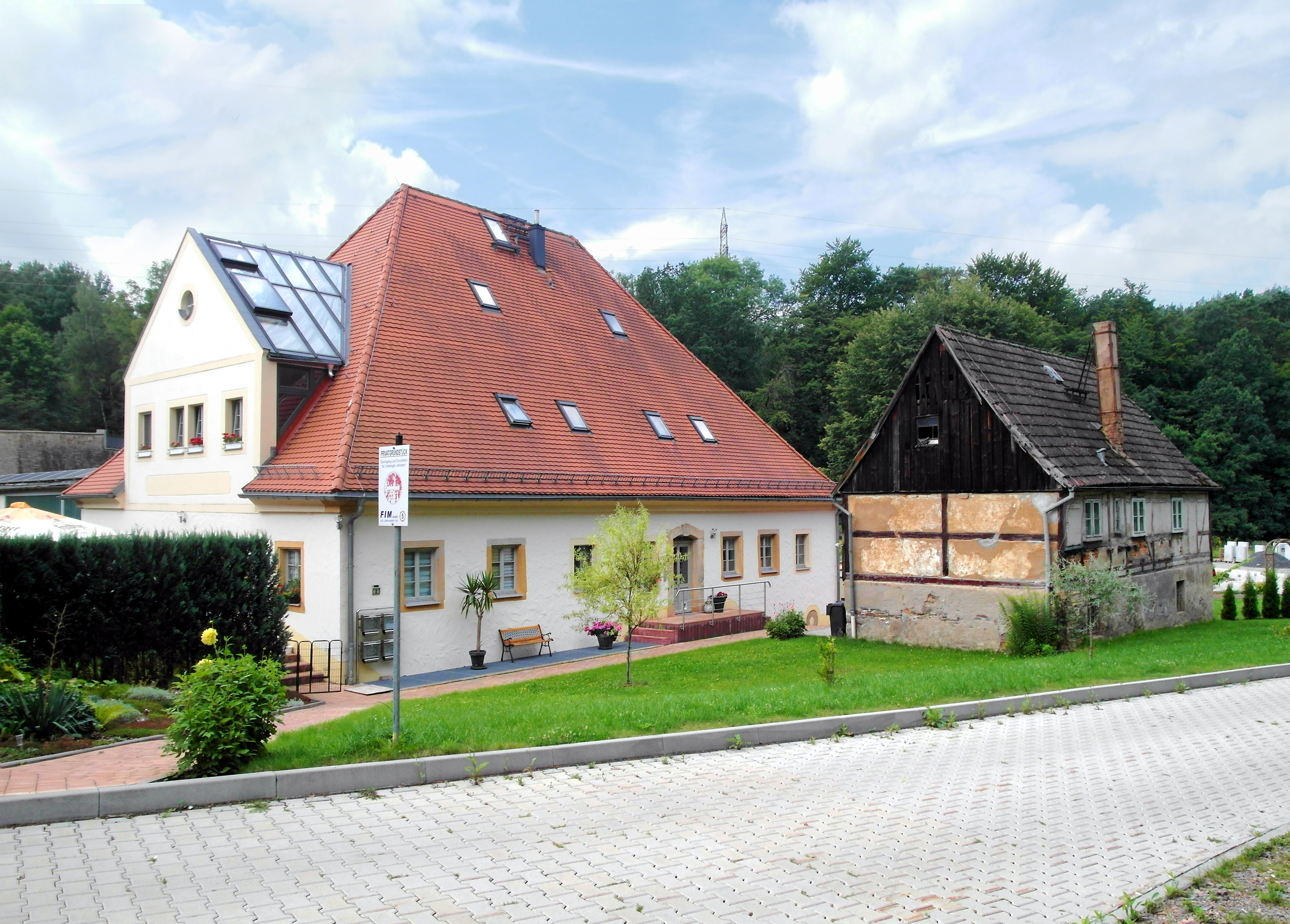 06.08.2017 09599 Halsbach / Neuhilbersdorf (Freiberg), Unteres Muldental 2 (GMP: 50.919288,13.374061): Die Hammermühle Halsbach/Neuhilbersdorf, Gebäude von 1739. Die ehem. Wassermühle wurde zeitweilig auch als Sägemühle betrieben. Heute Wohnhaus und Firmensitz. [SAM1322-JPG]2017080430DR.JPG(c)Blobelt